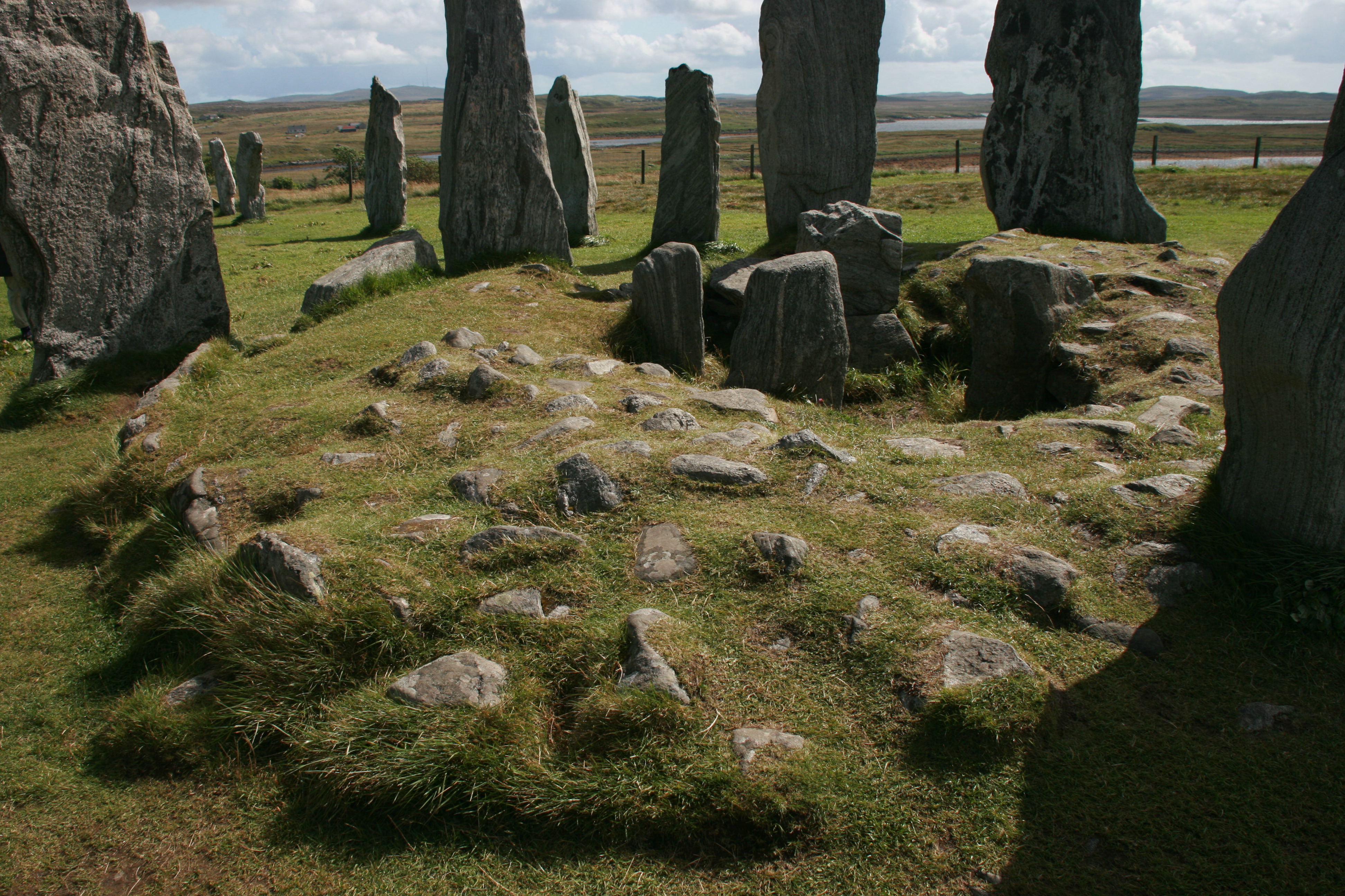 Piedras de Callanish en el verano de 2011. Erigidas en el Neolítico, están consideradas uno de los crómlech más importantes de Escocia. Se encuentran en las Hébridas Exteriores.